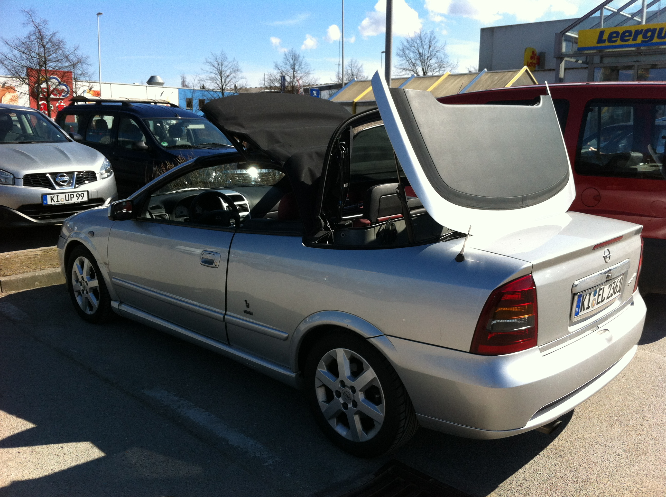 Stoffdachcabrio